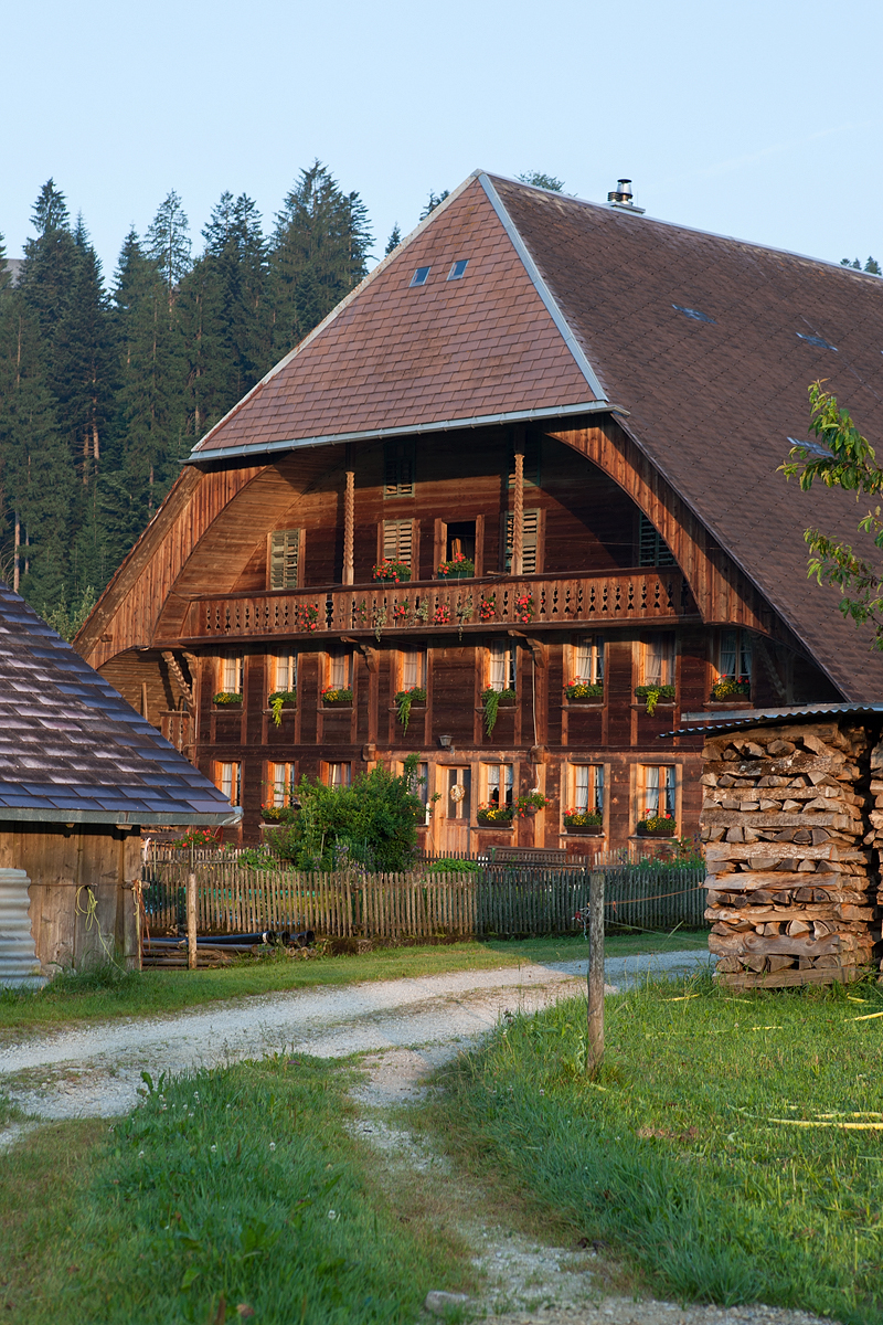 Einer der schönen Täuferhöfe in Fankhaus, Trub